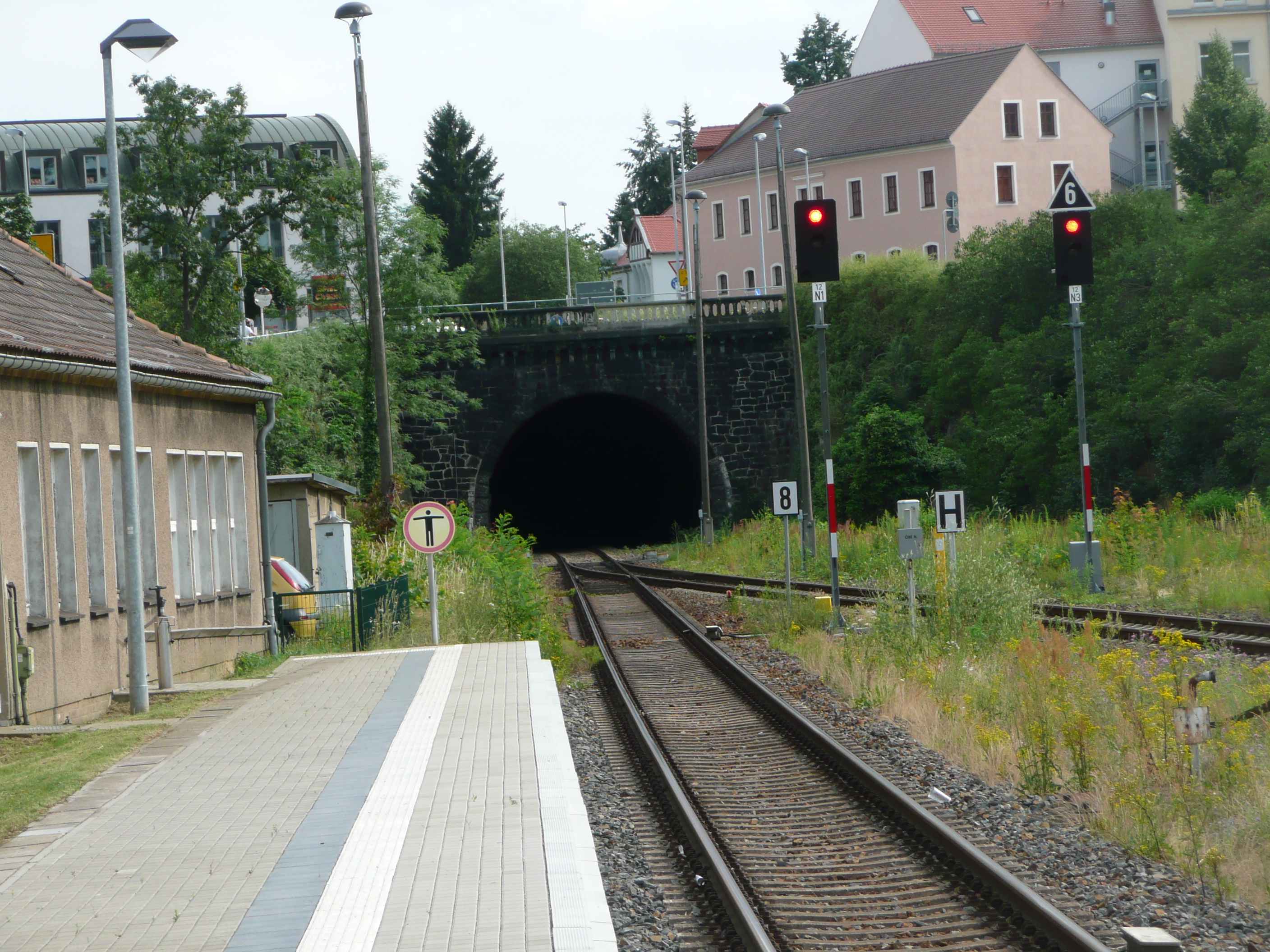 Ansicht des Kamenzer Stadttunnels von dem Bahnhof aus